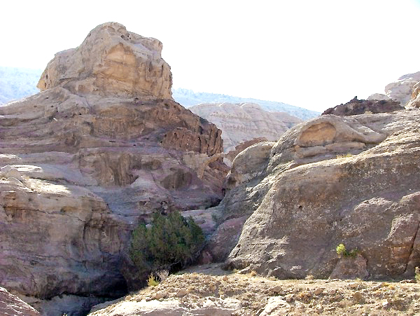 Aqueduc entre deux montagnes pour le passage d’un oued aux environs de Pétra.